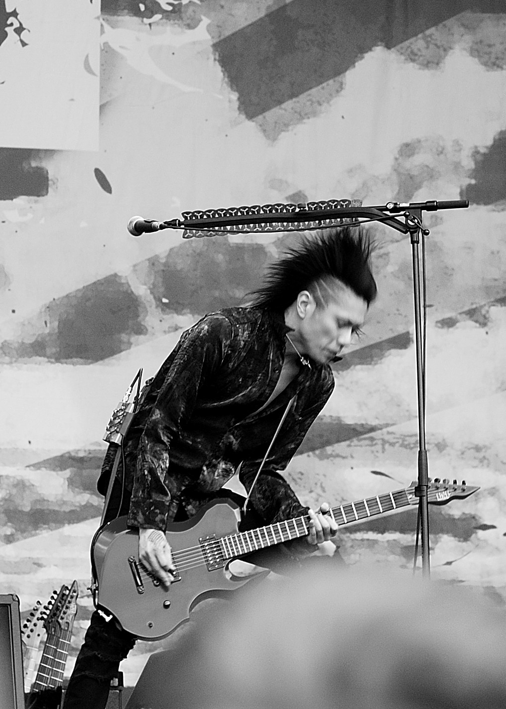 Die of Dir en grey, live at Rock im Park 2006.